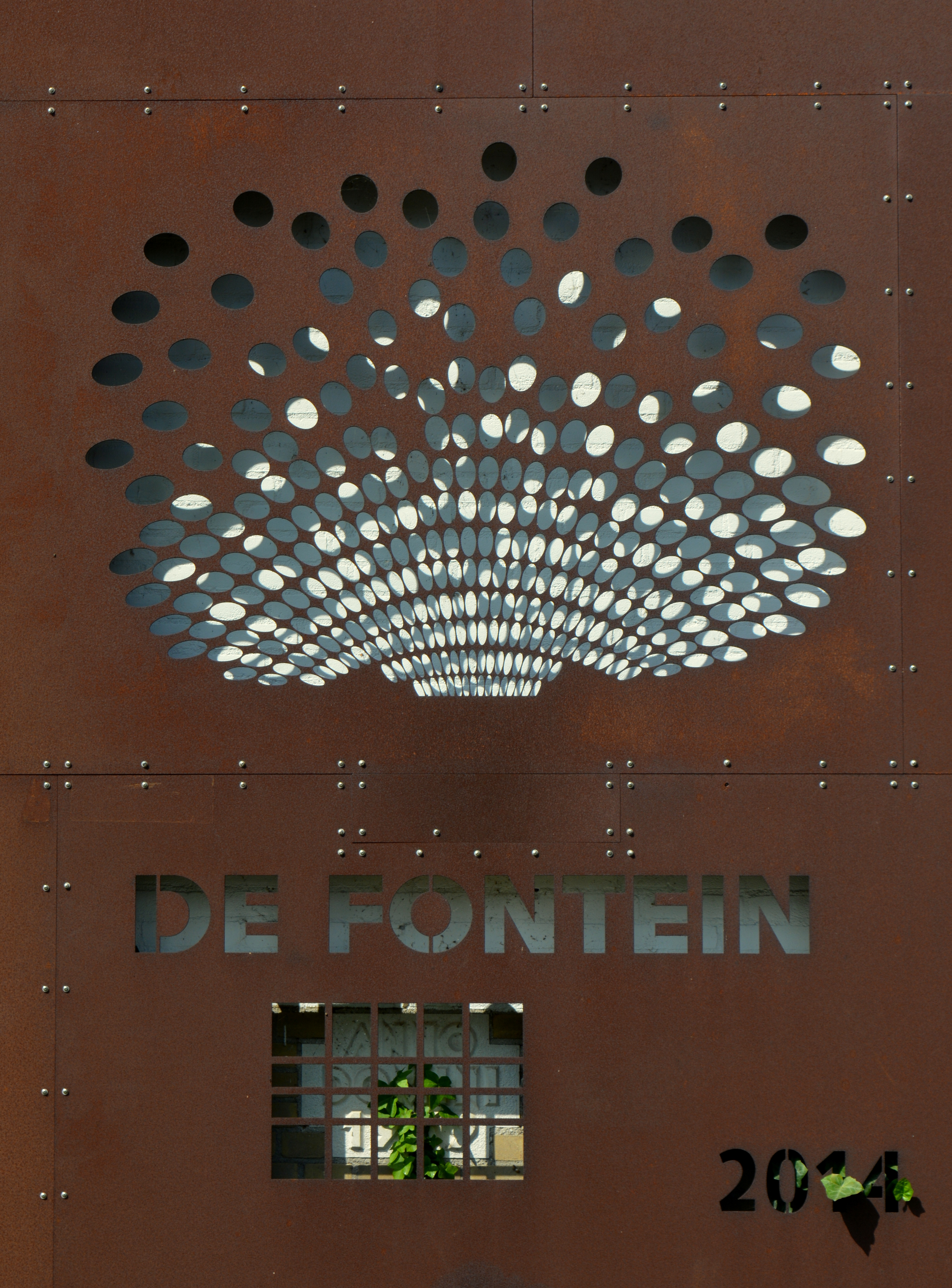 Leeuwarden, De Fontein (logo aan de muur)